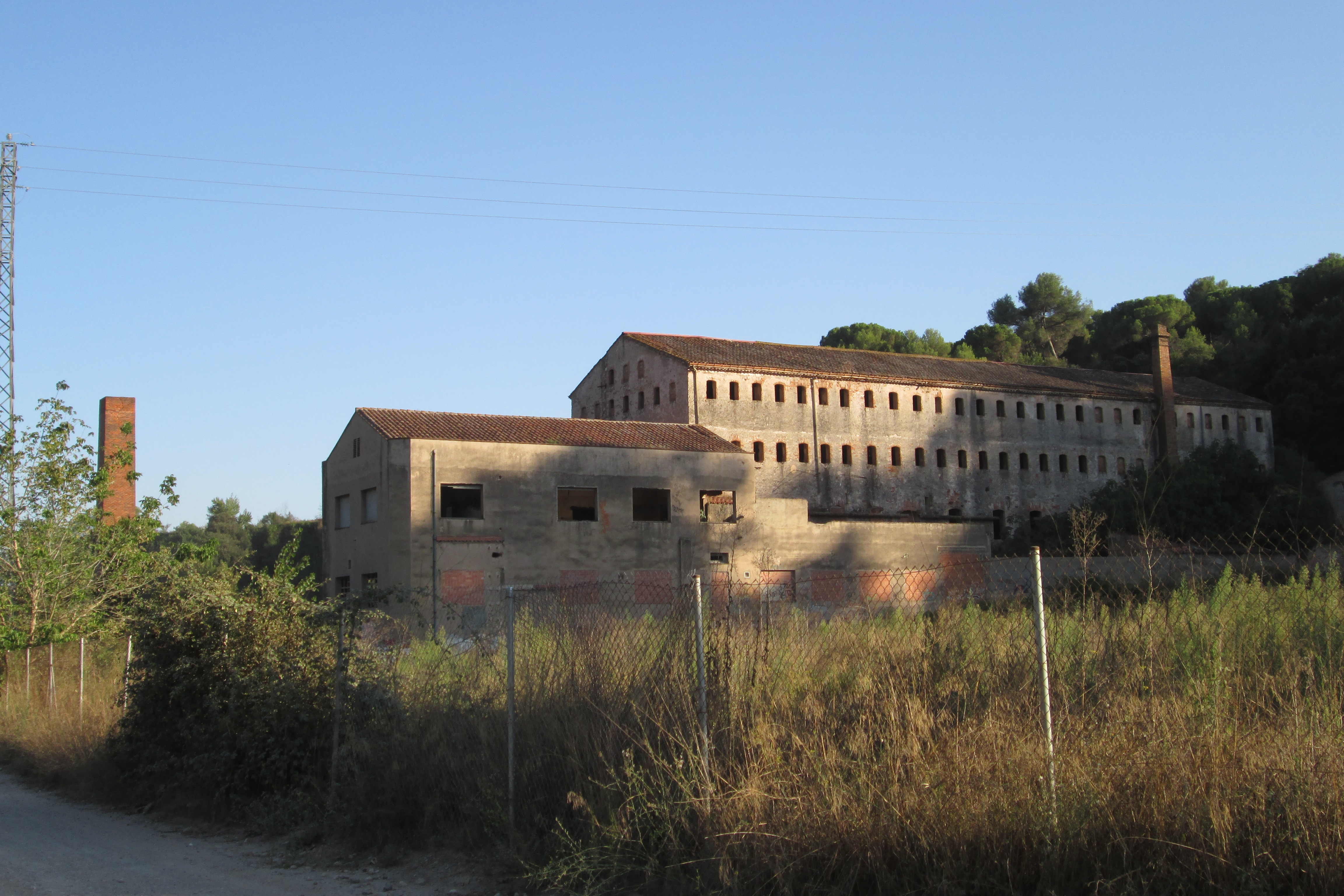 Molino Mornau, construido en el siglo XVI, está situado junto al río Ripoll cerca del puente de la carretera de Sabadell a Castellar, en el sector noreste y en las afueras de la ciudad de Sabadell, Barcelona (España).